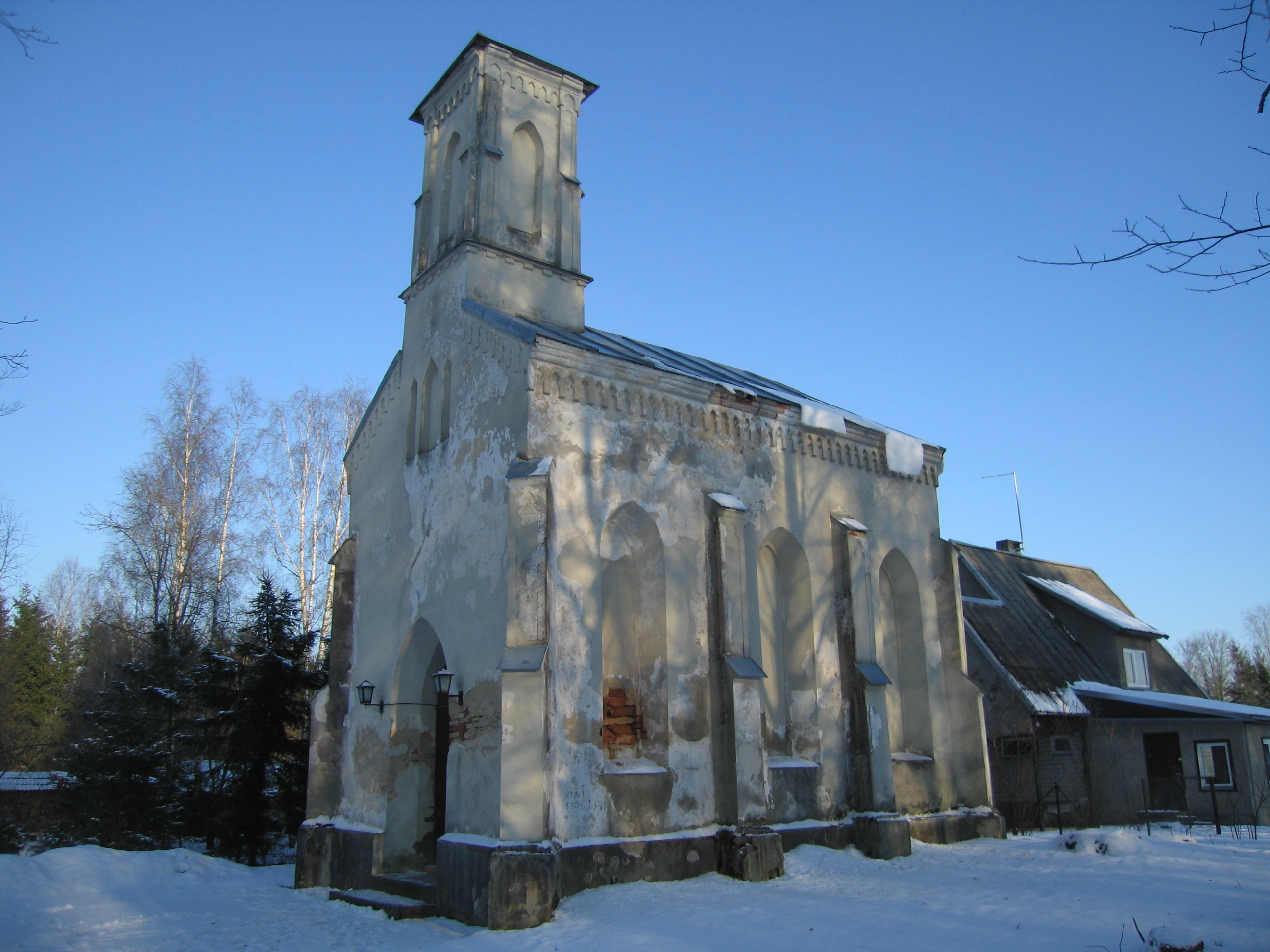 Kalmistu kabel